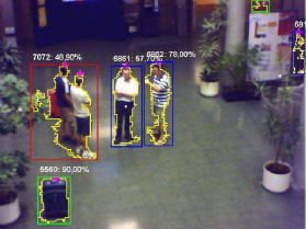 sense